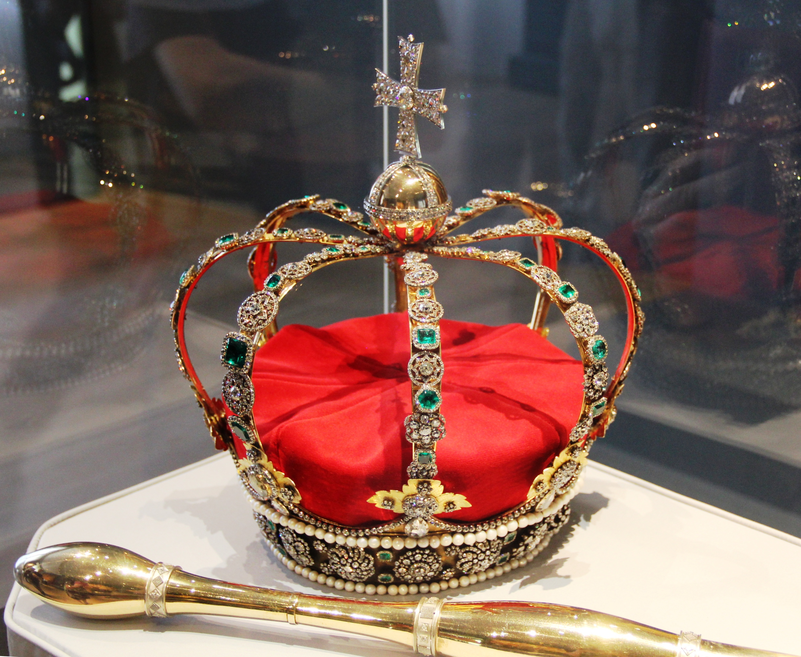 Württembergische Königskrone